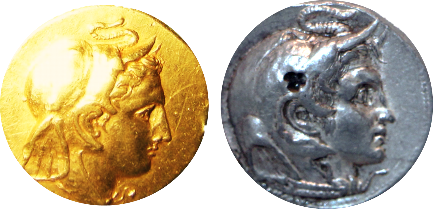 Moneta di Agatocle e Tolomeo I raffigurante Alessandro Magno, fine IV secolo a.C. Immagini originali già presenti su Commons o con lincenza trasferibile su Commons.